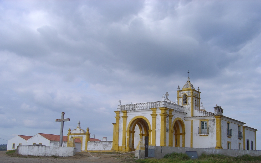 Ermida de Nossa Senhora do Bom Sucesso (1758), Torrão, Alcácer do Sal, Alentejo, Portugal